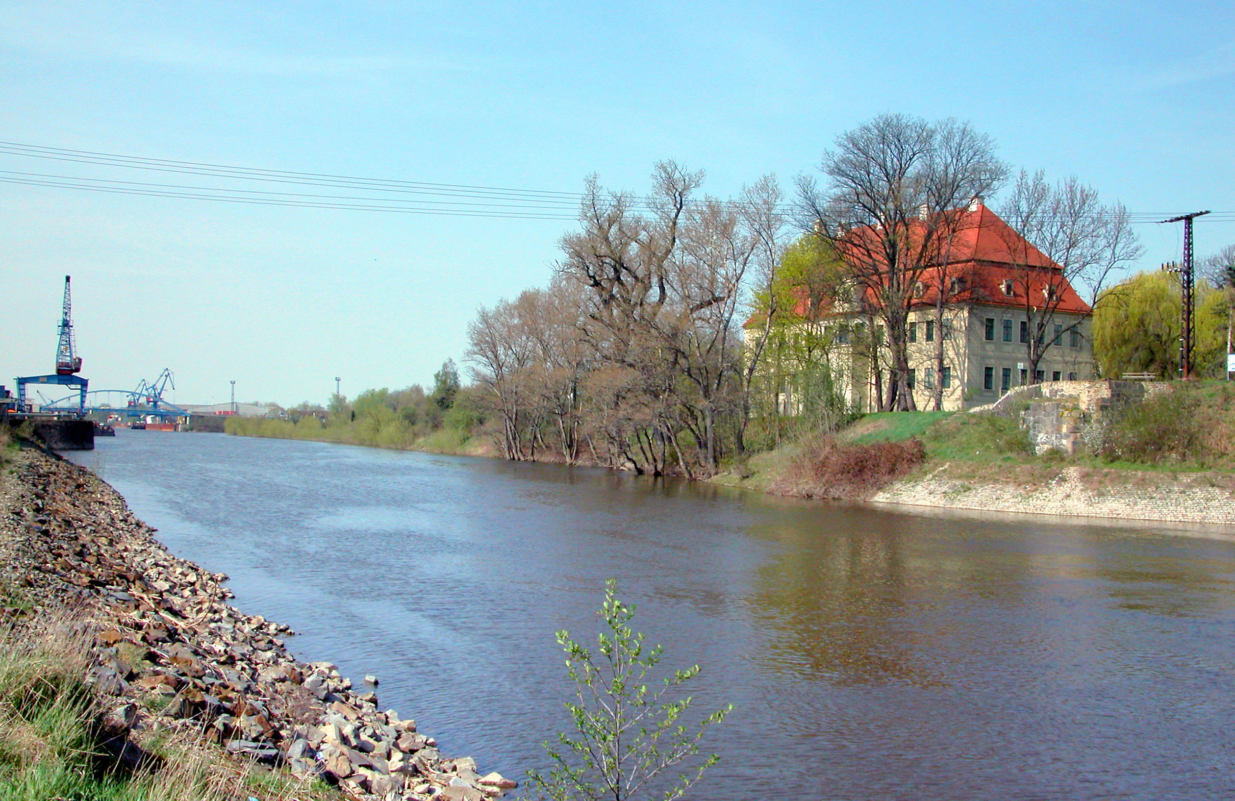 10.04.2009 01591 Gröba (Riesa), Kirchstraße 46: Schloß Gröba, 1707 für Johann Georg von Arnim und seine Frau errichtet. 1949 -1975 Altersheim, dann Leerstand. Ab 1983 Rat des Kreises Riesa / Landratsamt. 2001 privat verpachtet. Nach dem EIbehochwasser 2002 zog sich der Pächter wieder aus Gröba zurück. Seit 2012 nutzt ein Pflegedienst das Schloß. Sicht von Süden über den Elbehafenkanal. [DSCN36085.TIF]20090410135DR.JPG(c)Blobelt